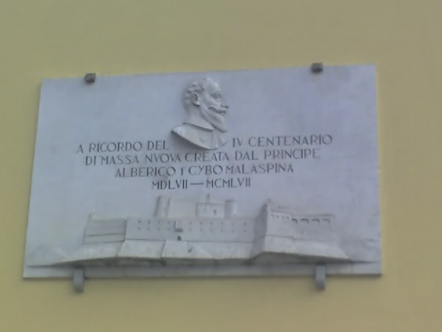 Targa posta in prossimità dell'antico Baluardo Martana delle mura di Massa in commemorazione della fondazione di queste da parte del duca Alberico Cybo-Malaspina, ritratto di profilo